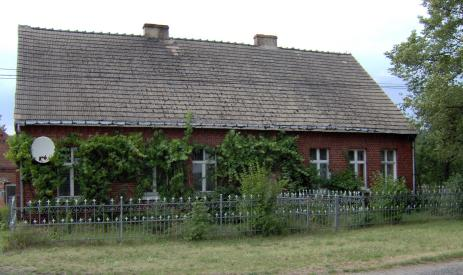 Stary dom ceglany w Krępsku, woj. zachodniopomorskie. Autor: Maks Saczywko (Soczewa)